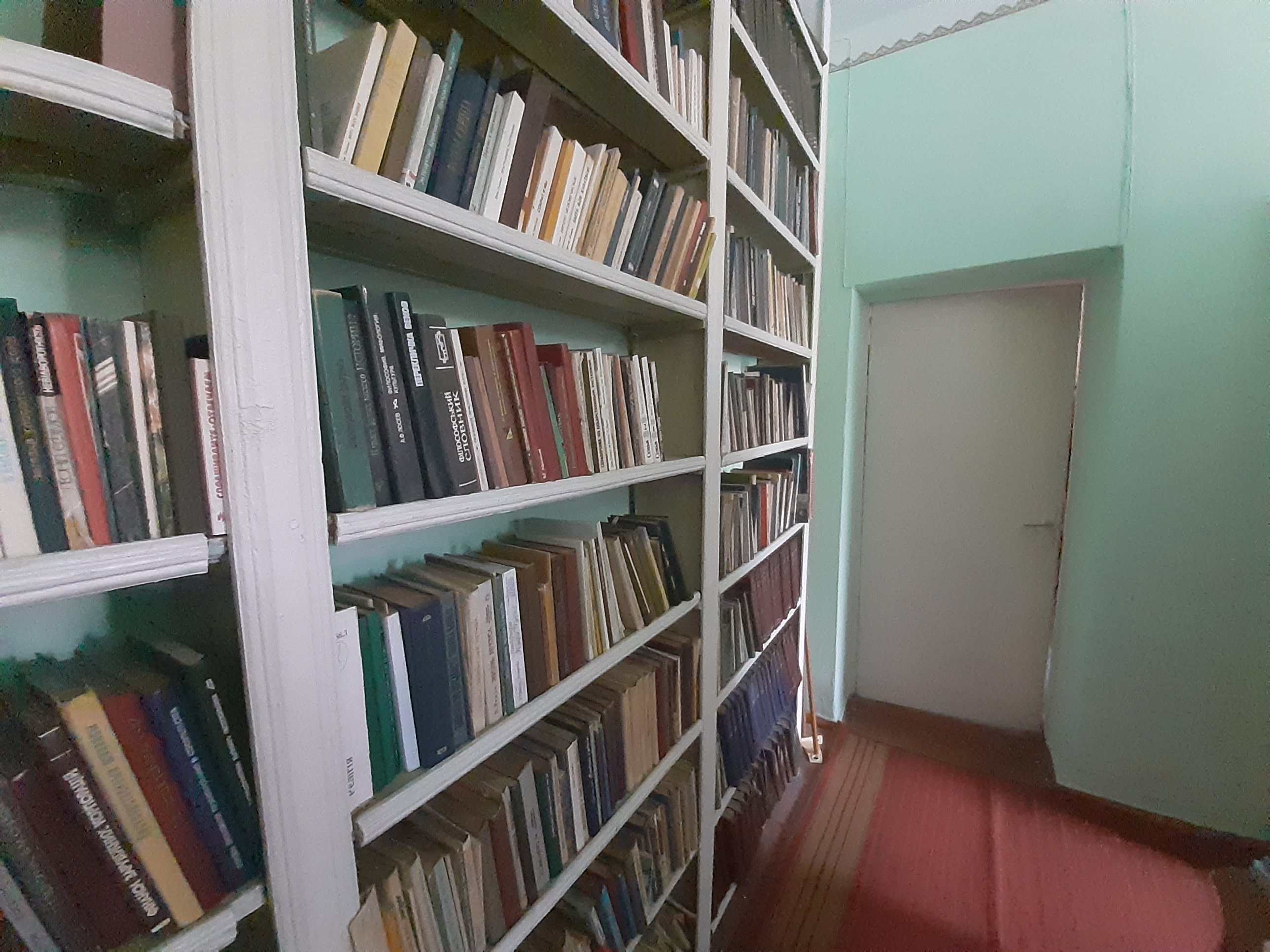 У книгосховищі Хмельницької міської бібліотеки-філії №11 зберігається книжковий фонд, який відповідно до запитів читачів надається їм у користування.